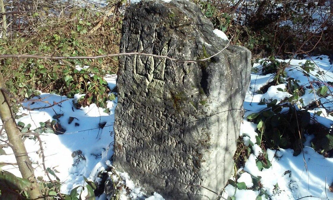 Пам'ятка встановлення на честь Унівського бою